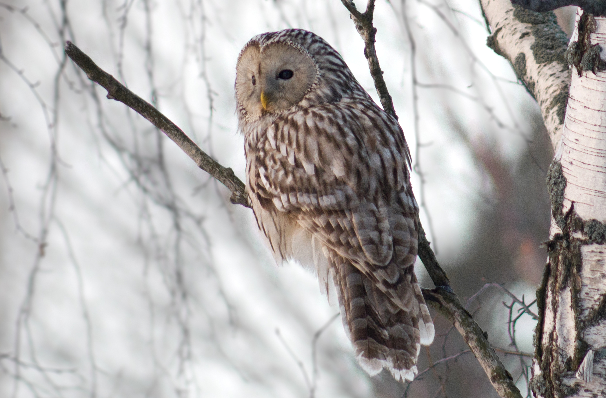 Ural Owl Strix uralensis, Kotka, Finland